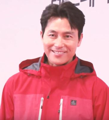 배우 정우성이 23일 오후 서울 강서구 강서로의 한 백화점에서 열린 포토행사에 참석했다.